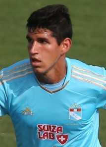 En su club, Sporting Cristal